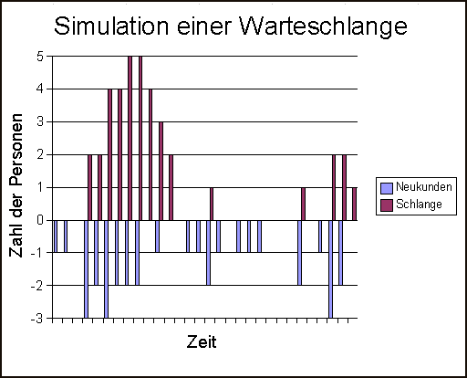 Simulation des Anwachsens einer Warteschlange.